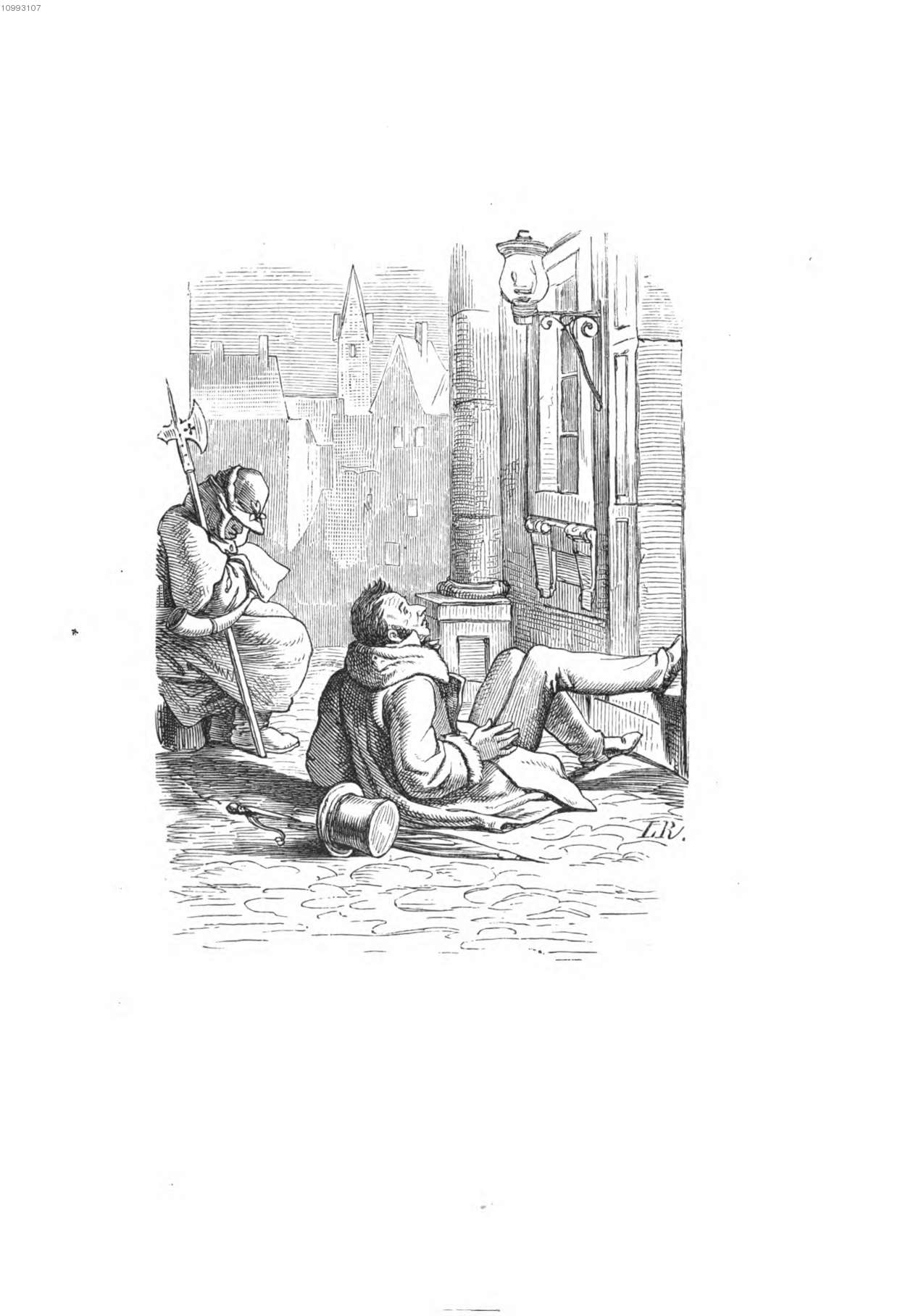 Illustration zu Hans Christian Andersen Märchen "Die Galoschen des Glücks" von Ludwig Richter